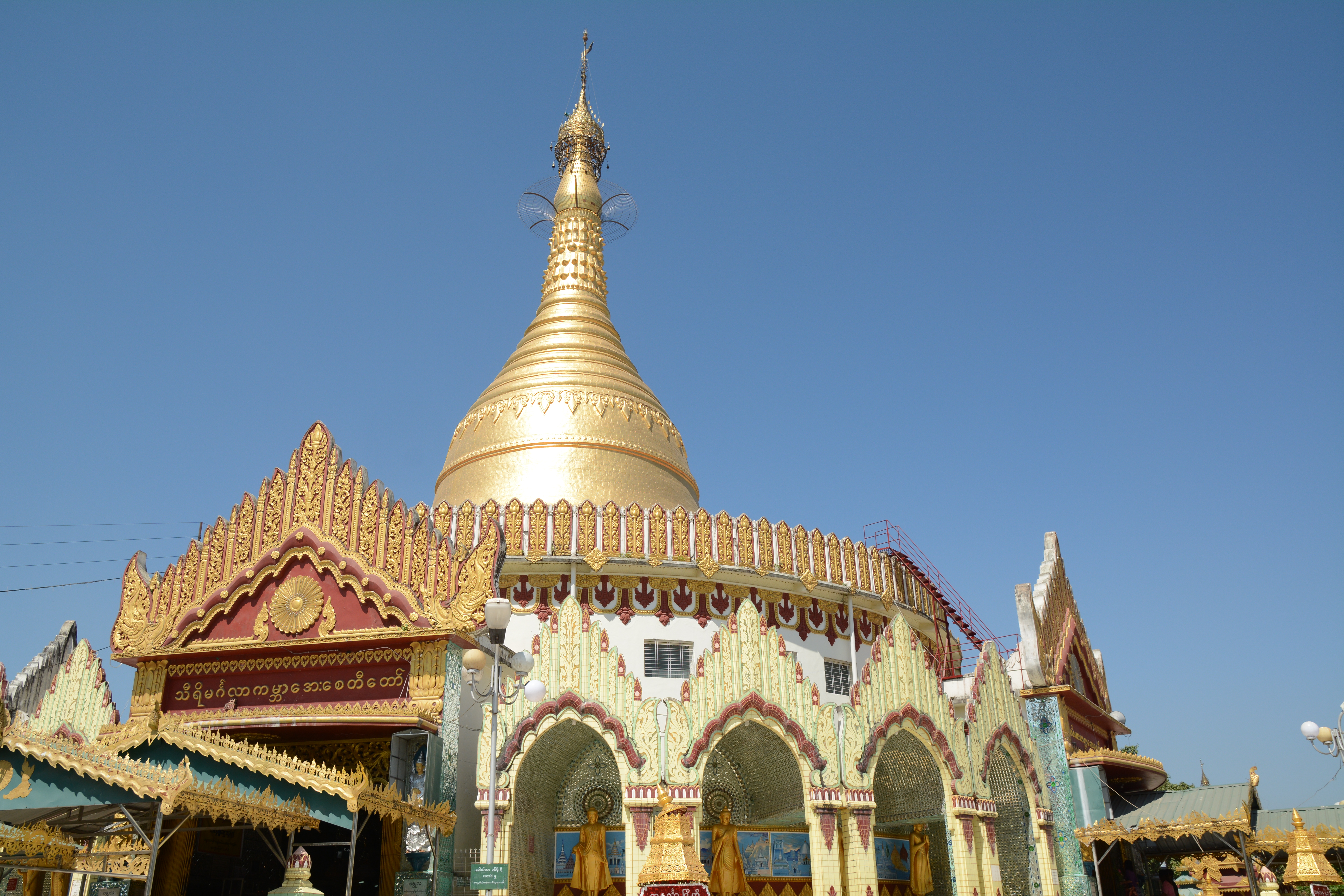 Kaba Aye Paya